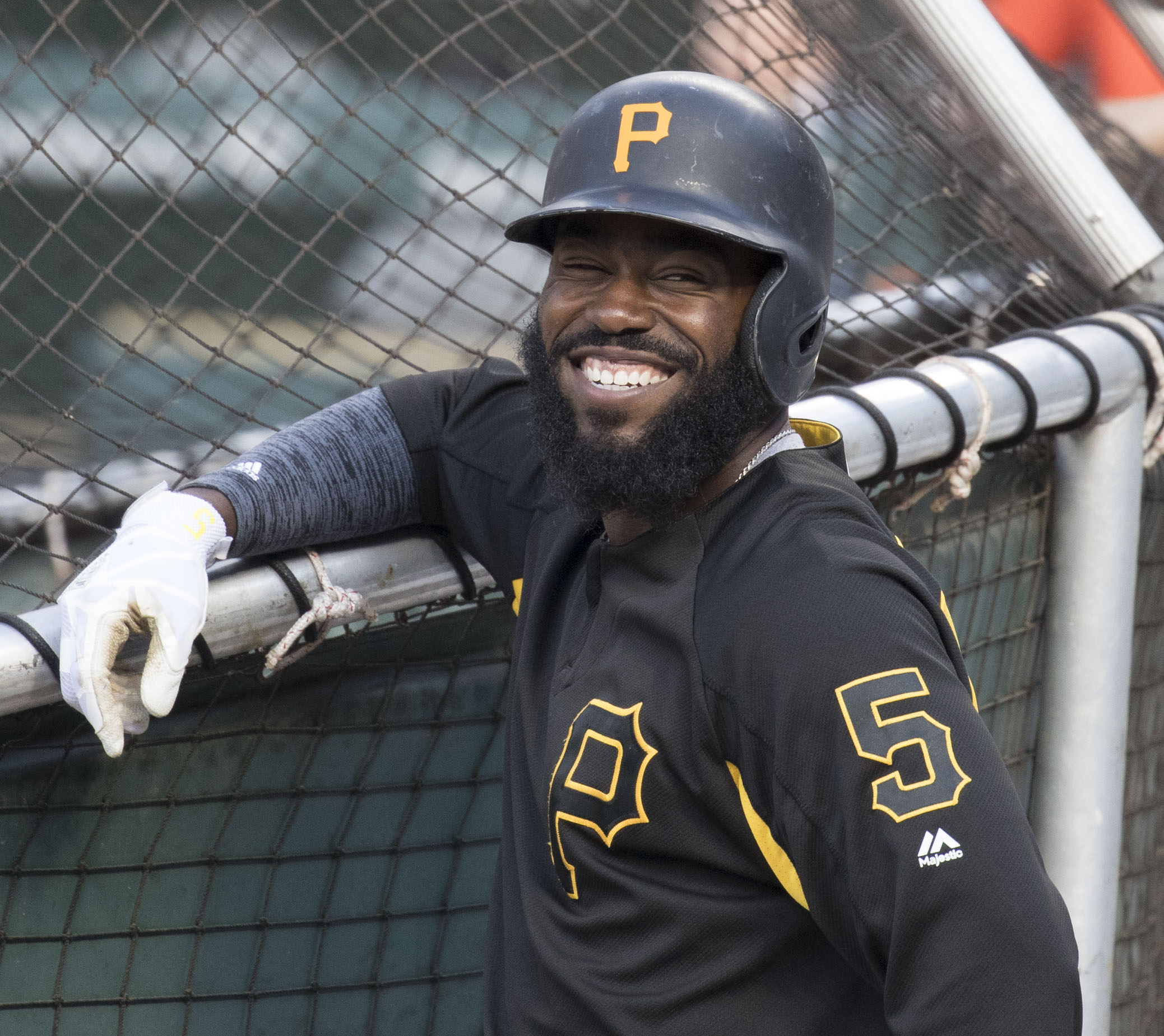 Pirates at Orioles 6/6/17